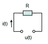 Condensador (capacitor)